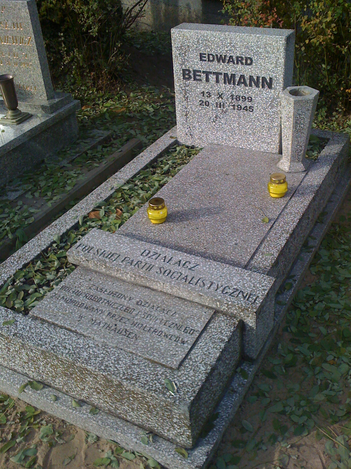 grob edwarda bettmanna,socjalisty